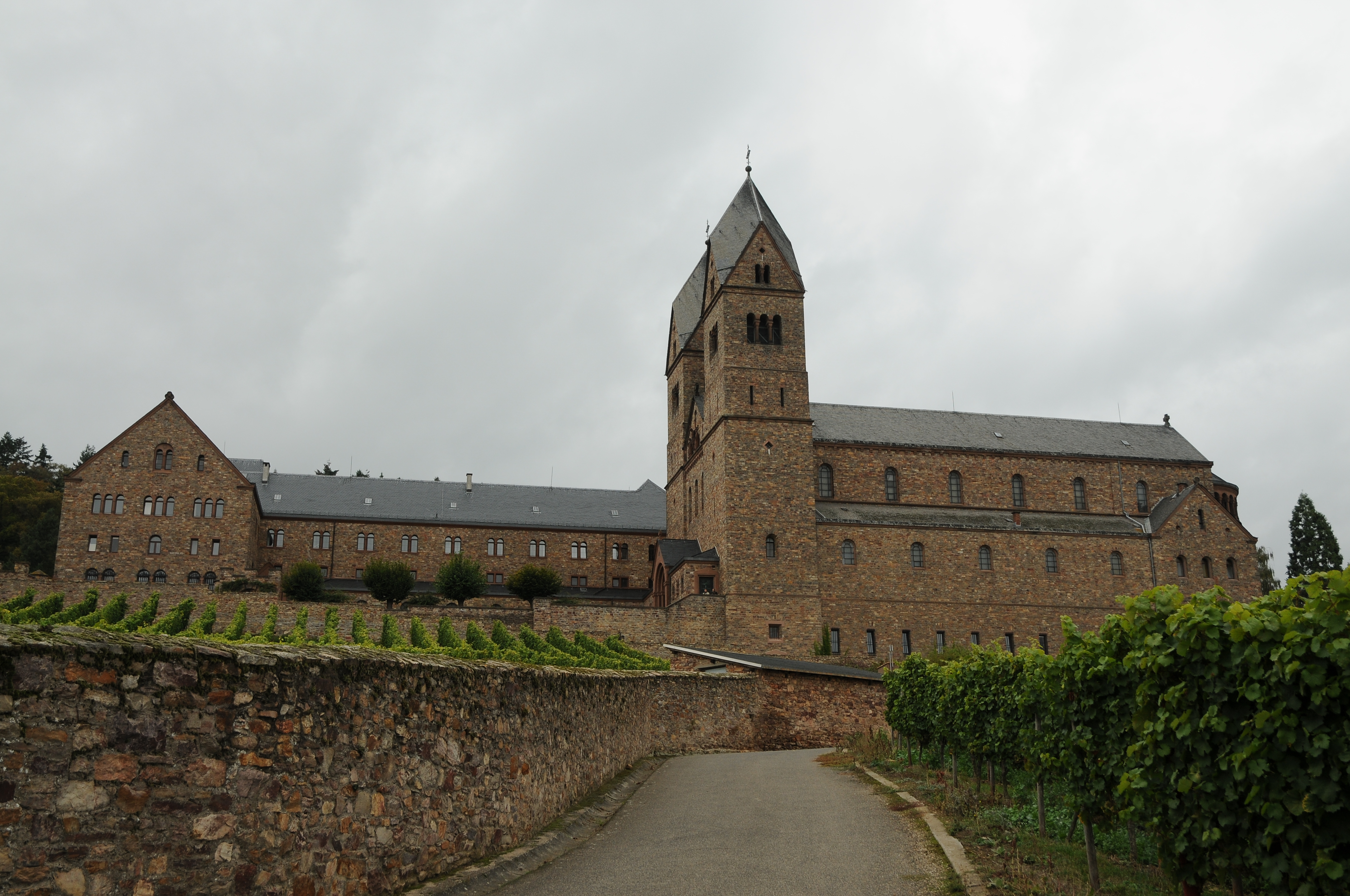 Abtei St. Hildegard Eibingen